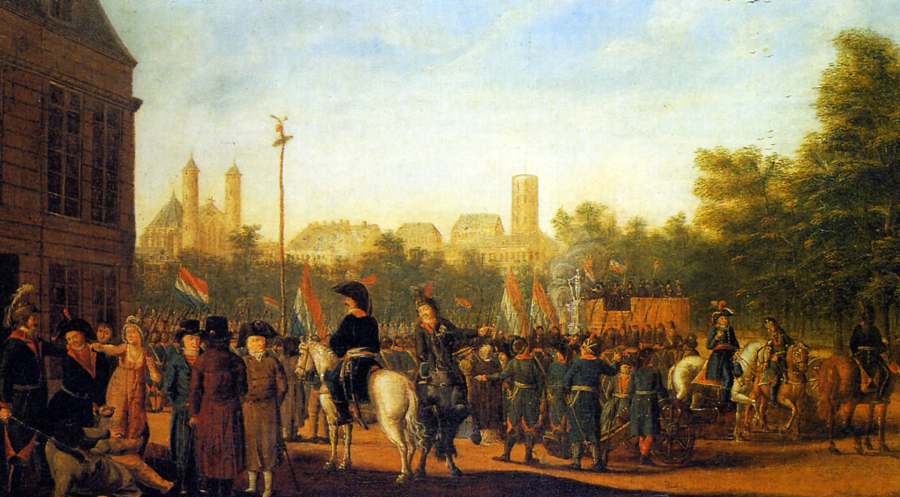 Historische Darstellung, Franzosen errichten einen Freiheitsbaum auf dem Neumarkt, Köln-1794